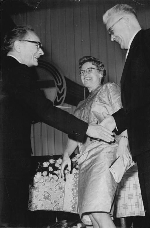 Magdeburg, 3. Arbeiterfestspiele, Preisverleihung Zentralbild Eckleben 16.6.1961 3. Arbeiterfestspiele des FDGB. "Preis für künstlerisches Volksschaffen 1961" in Magdeburg verliehen. Der "Preis für künstlerisches Volksschaffen 1961" des Ministeriums für Kultur wurde während einer Großveranstaltung, die Radio DDR unter dem Motto "Wir bauen einen schönen Garten" gestaltete, am Abend des 14.6.1961 in der Magdeburger Hermann-Gieseler-Sporthalle verliehen. Kurt Bork, Hauptabteilungsleiter im Ministerium für Kultur, zeichnete im Auftrage von Minister Hans Bentzien 28 Kollektive und Einzelpersonen aus. UBz: Kurt Bork (links) zeichnet Hans und Ilse Naumilkat, Komponist und Leiter des Kinderchores des Berliner Rundfunks mit dem "Preis für künstlerisches Volksschaffen 1961" 1. Klasse aus.